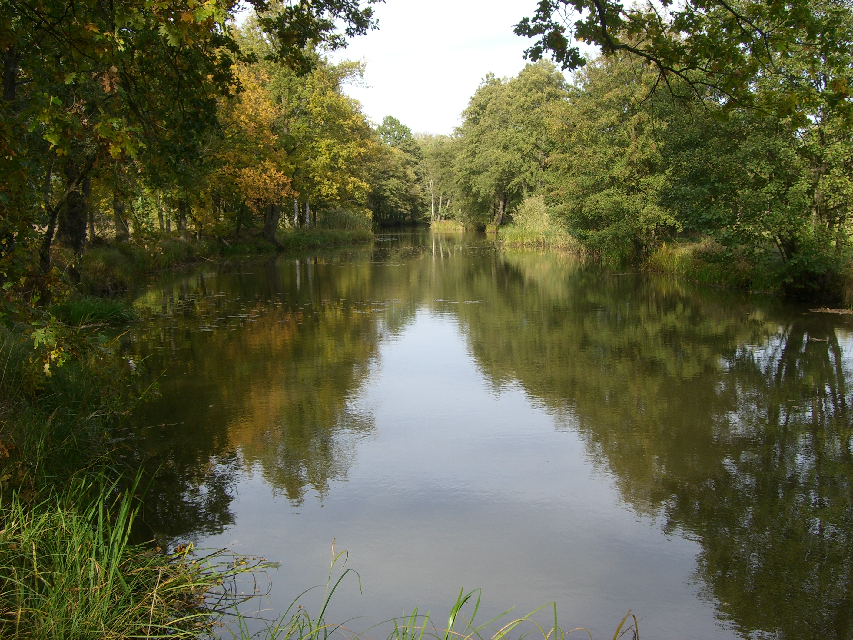 Der alte Flussverlauf der Schwarzen Elster bei Löben